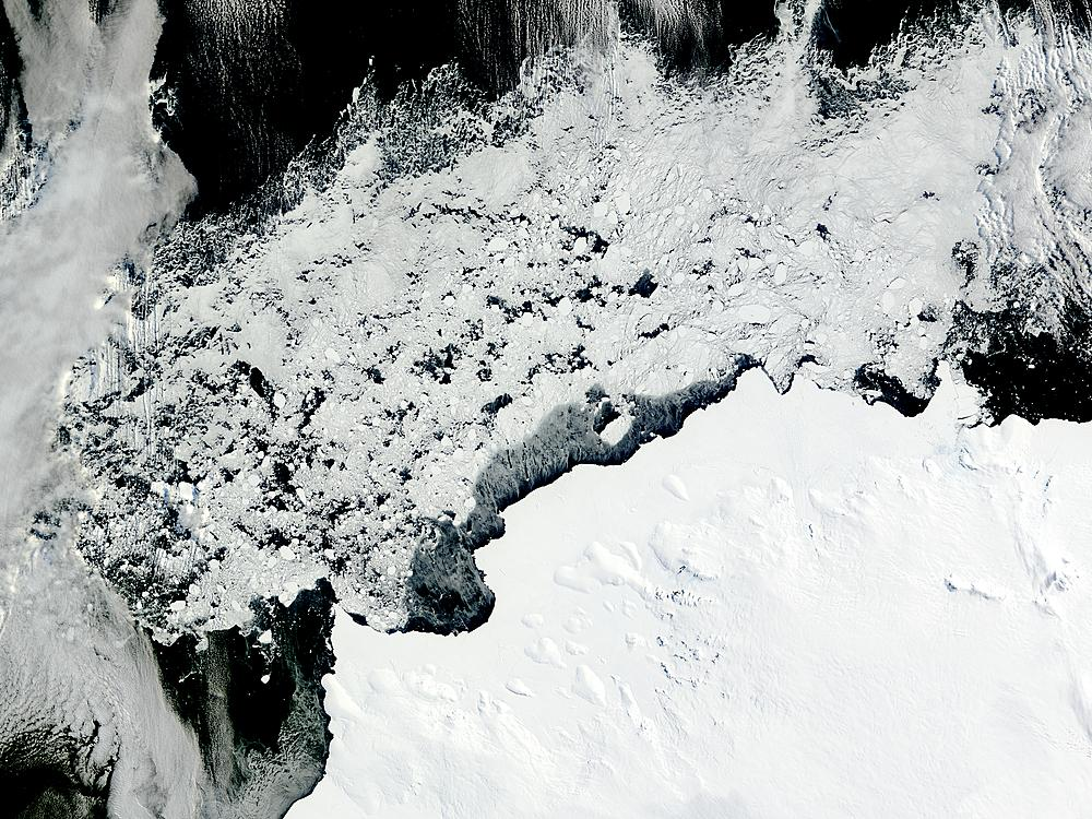 Satellitenaufnahme der Ross Sea von Nasa's Visible Earth in Public Domain Fundstelle